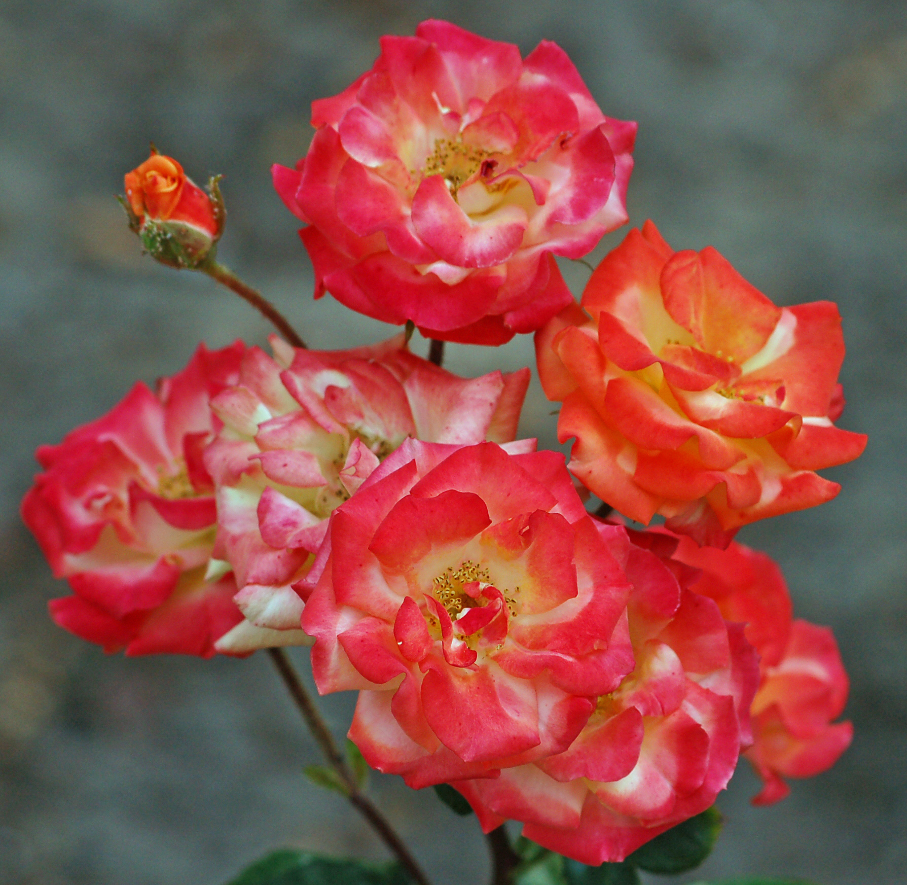 Floribunda Mambo (Tantau 1996) im Rosarium Uetersen